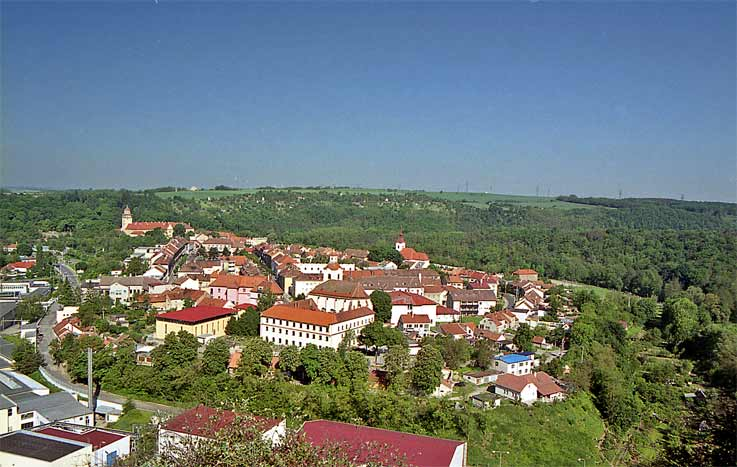 Moravský Krumlov ze stráně v NPR Krumlovskomoravské slepence.